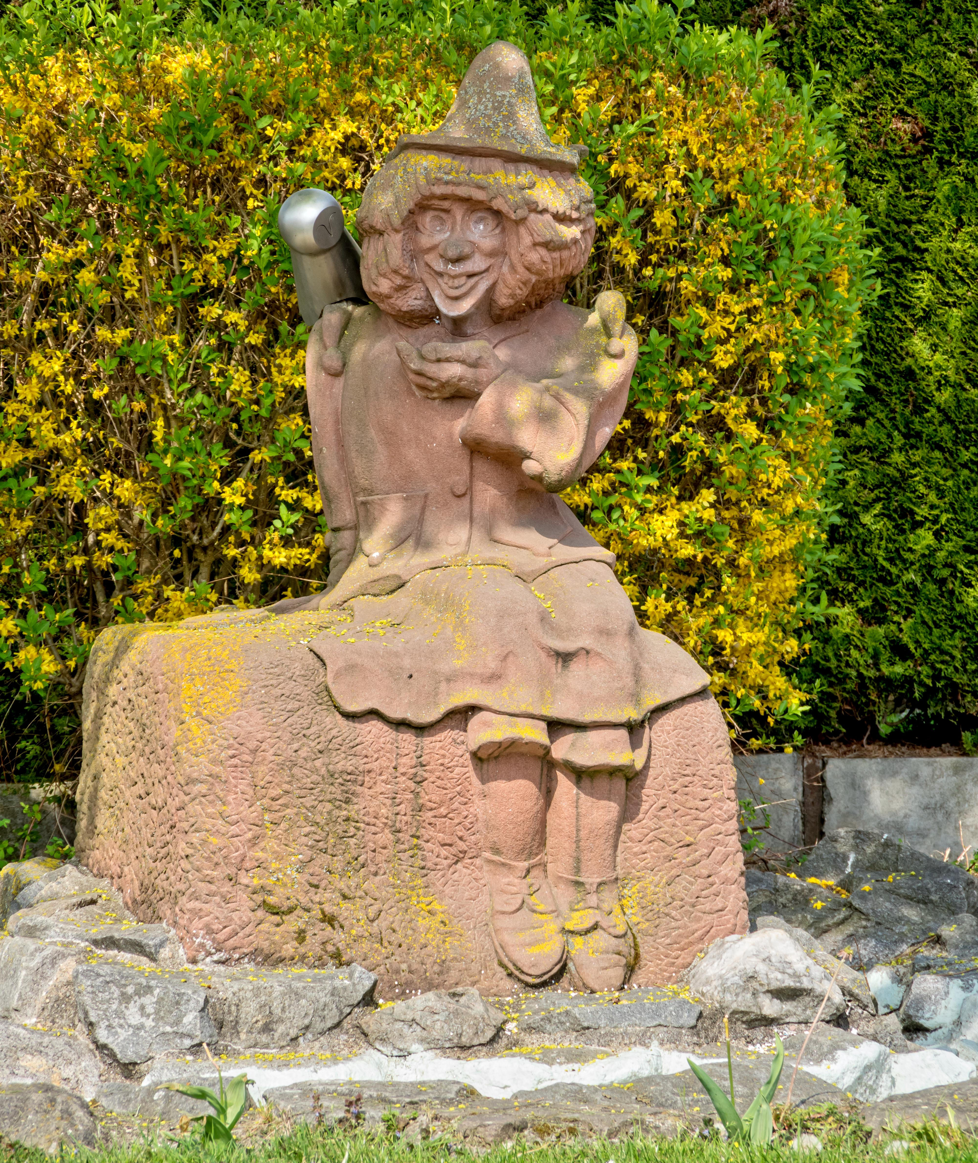 Bilder aus dem Landkreis Emmendingen Oberreute Der Narrenbrunnen der Narrenzunft "Riddemer Schrättele" steht in Oberreute in der Hauptstraße